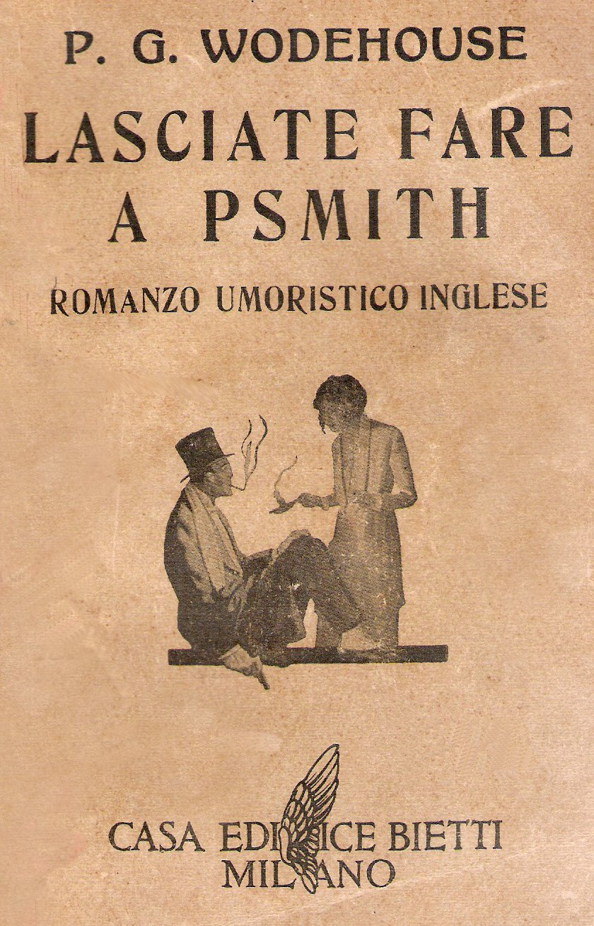 copertina di libro edito nel 1936